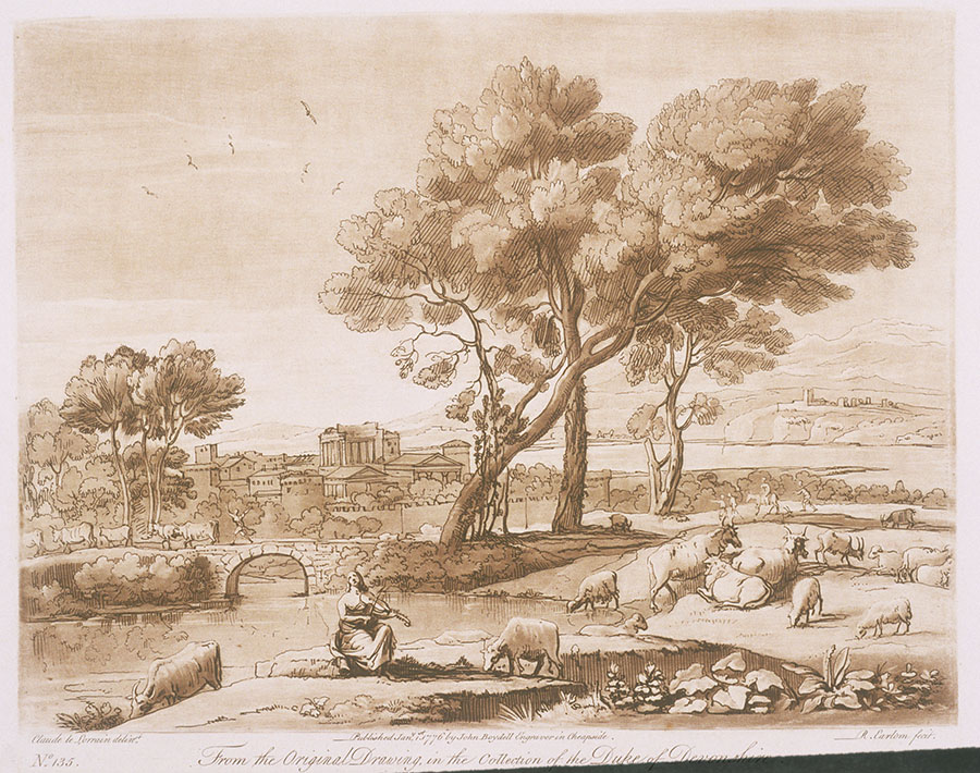 Paisaje con Apolo custodiando los rebaños de Admeto y Mercurio robándoselos, dibujo del Liber Veritatis número 135.